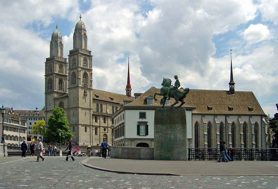 Das Grossmünster die Münsterbrücke und das Helmhaus/Wasserkirche in Zürich